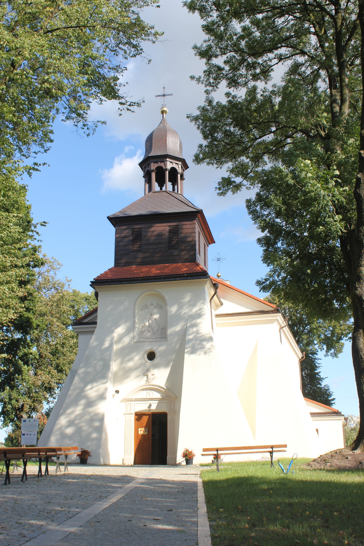 Hornjoserbsce: Cyrkej swj. Podjeća w Skierbieszowje, Lublinske wojewódstwo, Pólska.